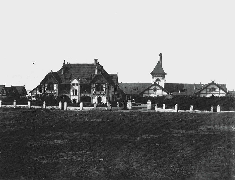 青岛总督府屠宰场